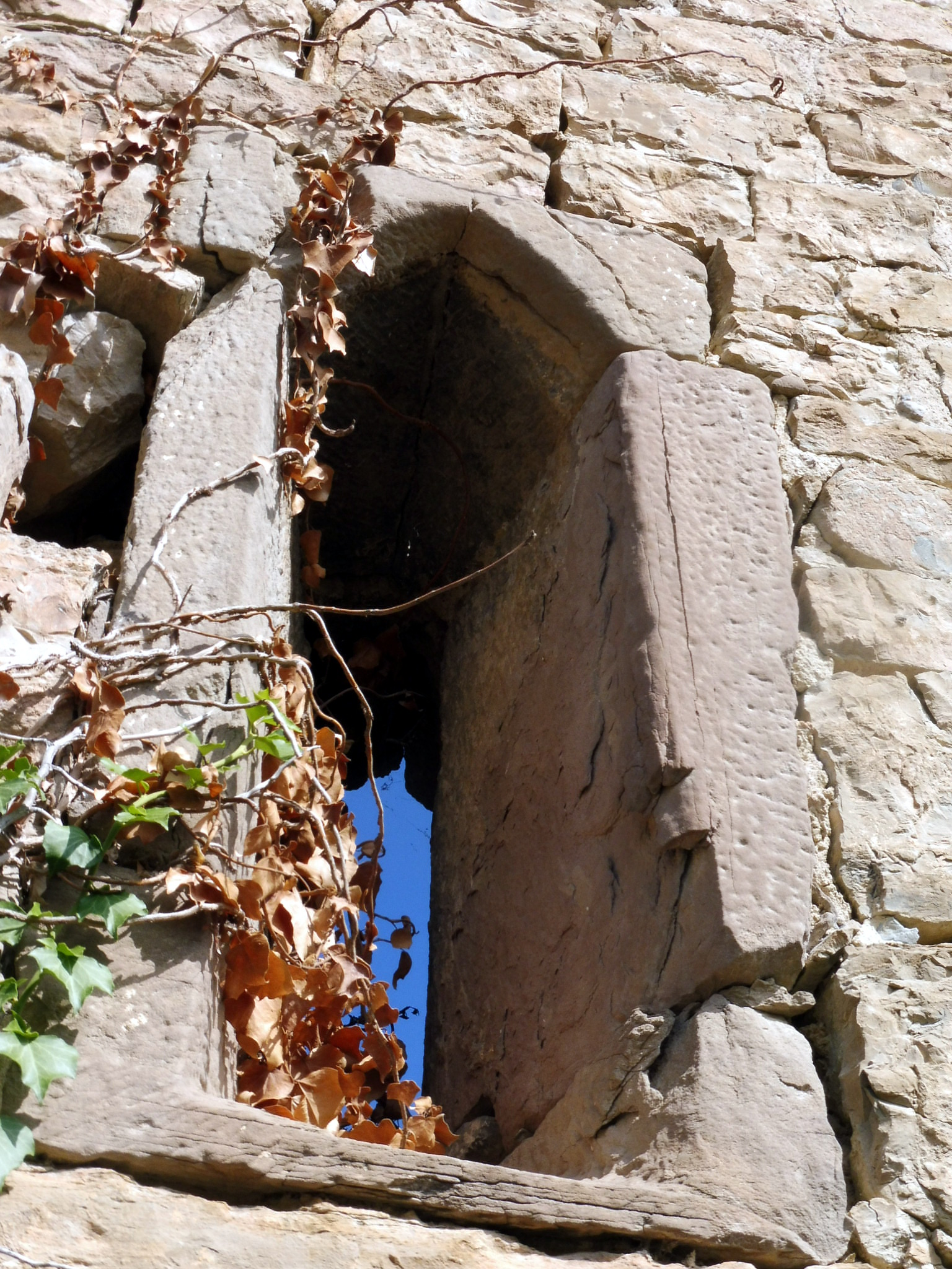 La Sala (Sant Mateu de Bages): finestra - espitllera This is a a photo of a natural area in Catalonia, Spain, with id: ES510180